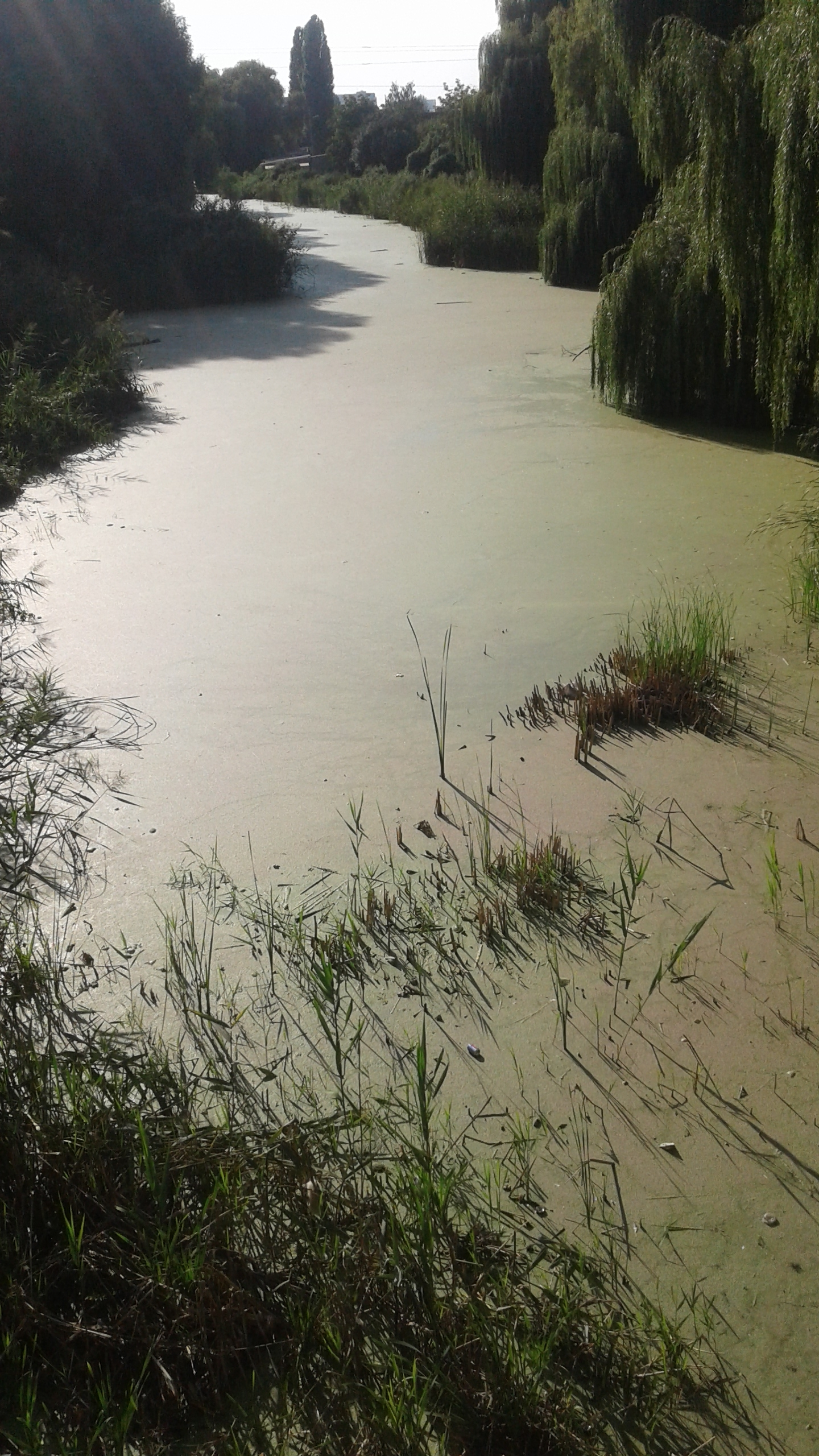 Річка Альта коло ТРЦ Магніт